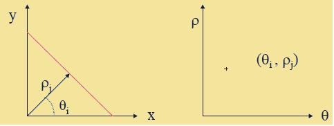 rectas